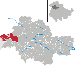 Verwaltungsgemeinschaft Hildebrandshausen/Lengenfeld unterm Stein in Thuringia - Unstrut-Hainich-Kreis